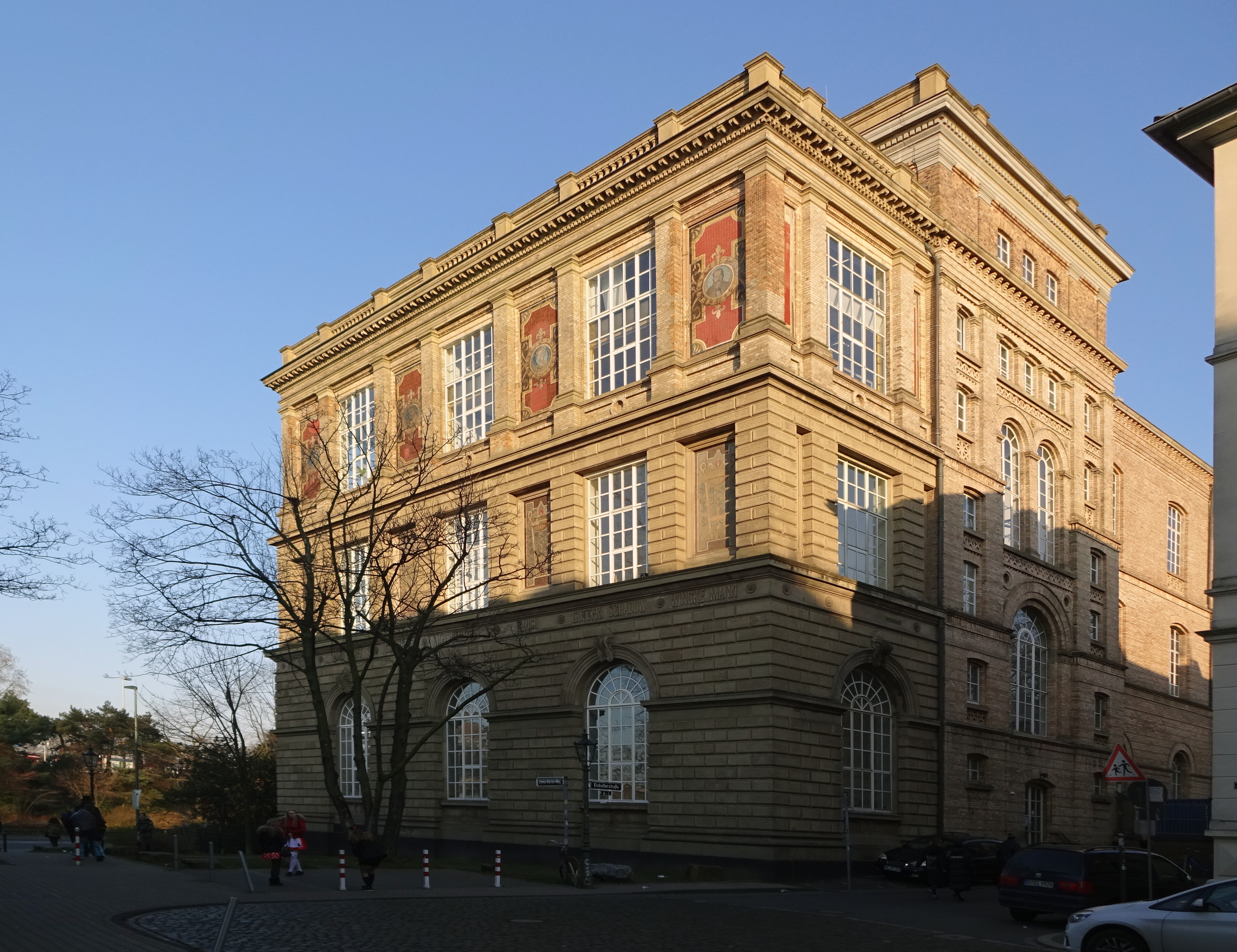 Kunstakademie Düsseldorf Westseite Emma-Horion-Weg Ecke Eiskellerstraße. Tonstiftmosaike mit Abbildung von Künstlern, so wie Mosaike Flammenschalen und Kandelaber. Gefertigt nach Angaben von Adolf Schill, Ende der 1890er Jahre. Fries mit Namen Pet. Vischer, Adam Kraft, Schlueter, Thorwaldsen, Rauch, Gottfr. Schadow, Winckelmann